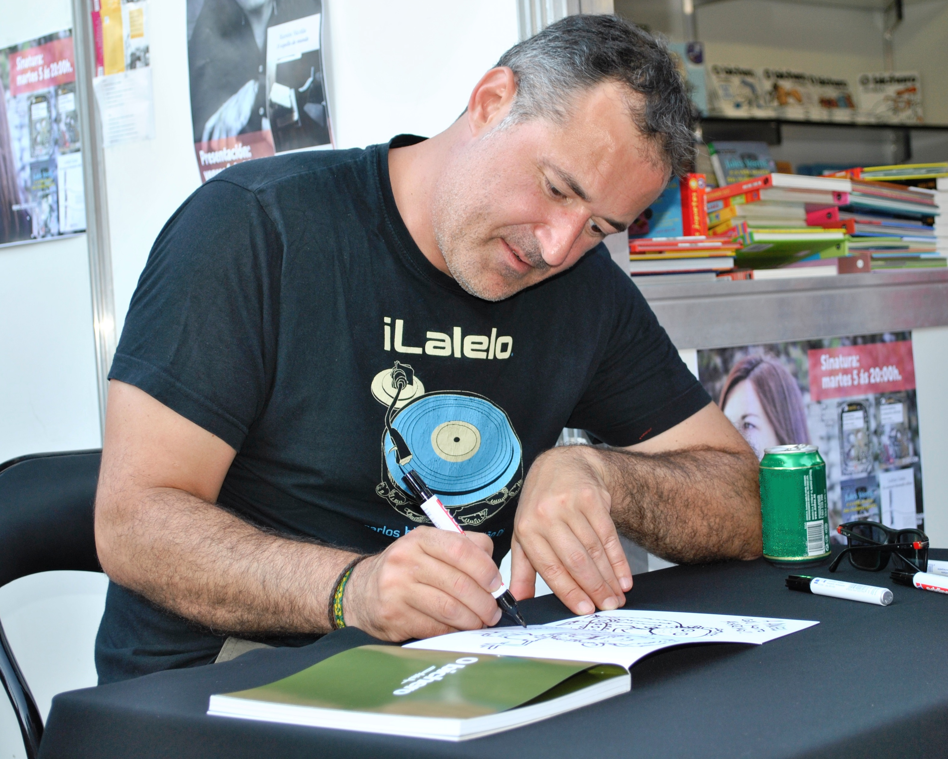 Luís Davila Malvido (1972), asinando o libro O Bichero VI. Ti sacha!, ISBN 978-84-608-7545-1, na Feira do Libro, rúa do Príncipe de Vigo. Fotografía tirada ao aire libre na vía pública.